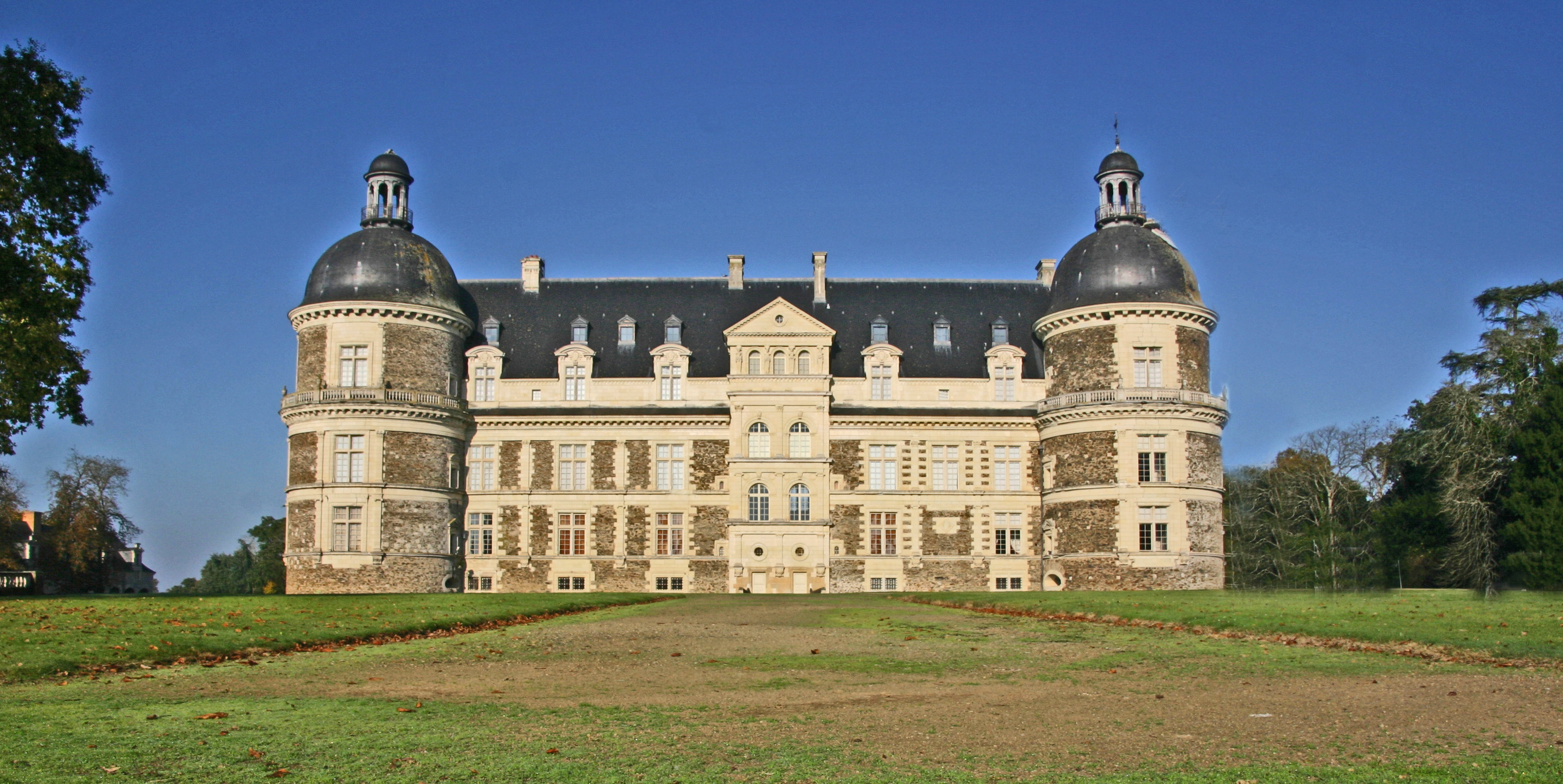 Schloss Serrant